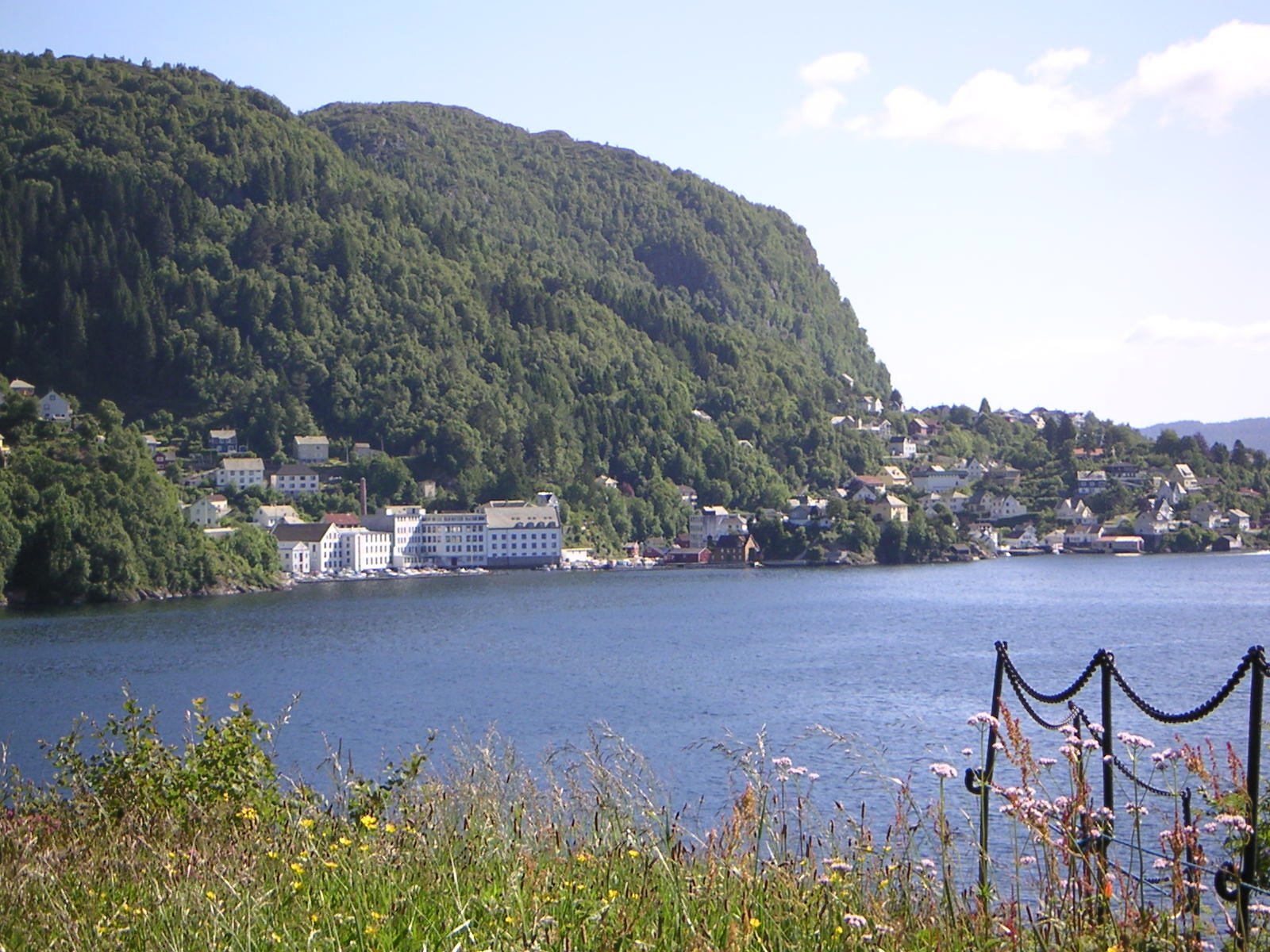 Salhus i Bergen